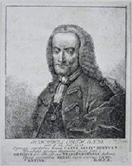 Bildnis des Frankfurter Juristen Johann Philipp Orth (1698–1783)